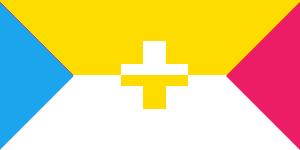 Прапор с. Шибалин